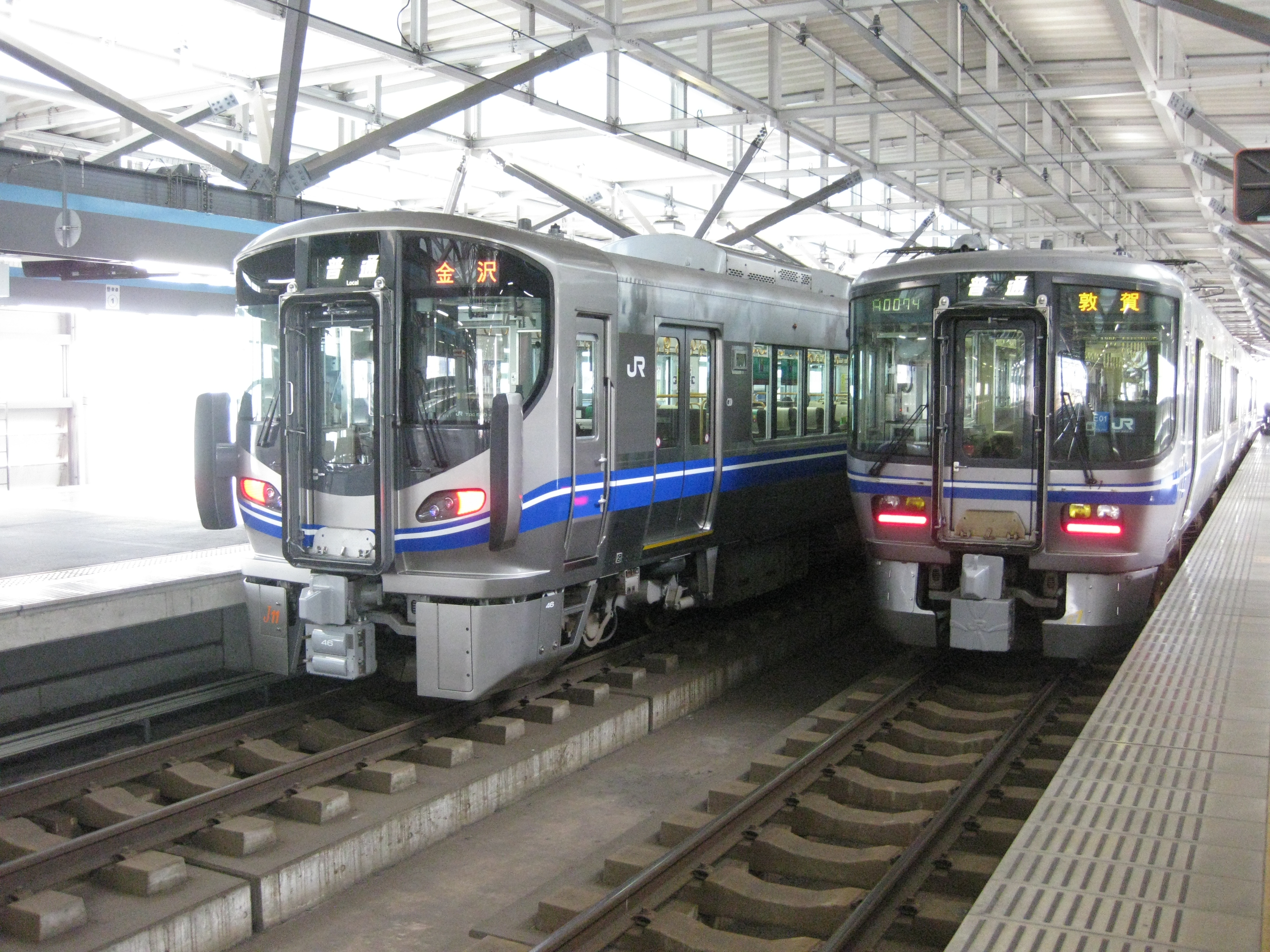 右側がJR西日本521系電車1次車で、左側が3次車です。